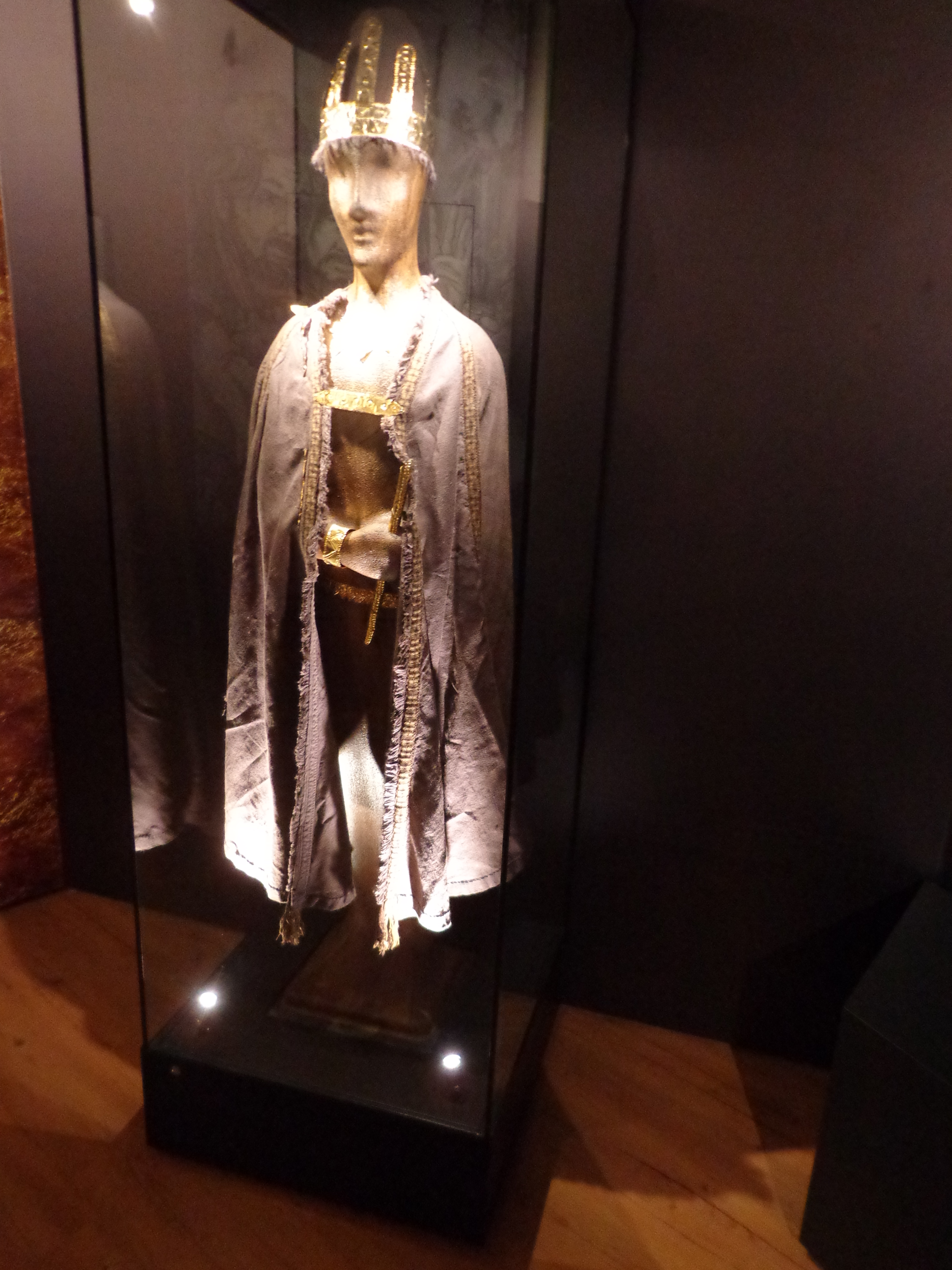 Figur trägt die Nachbildungen des in Bernstorf gefundenen Goldschmucks